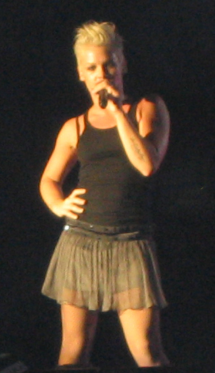 P!nk live in Freiburg